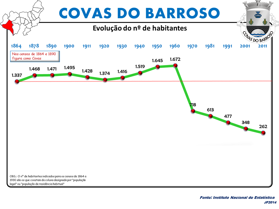 Evolução da População 1864 / 2011